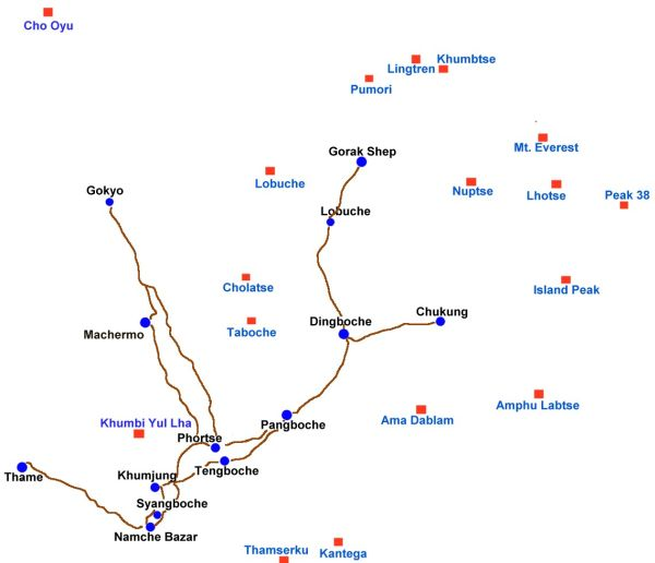 Schematische Karte des Khumbu